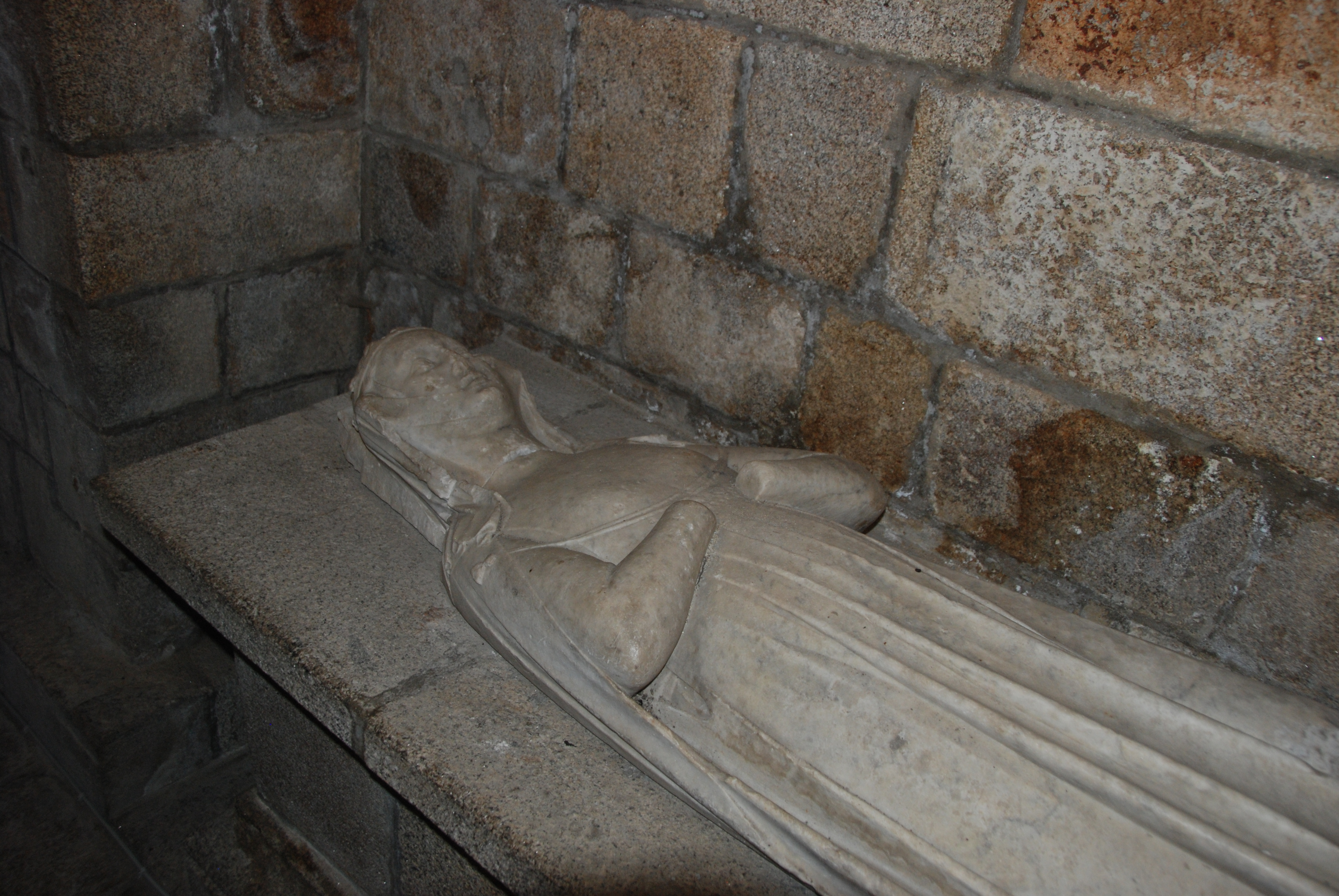 Tombeau de Jeanne, vicomtesse de Léhon, douairière de la maison de Largoët, épouse de Jean Bonable III - Statue en marbre blanc (XIVème)